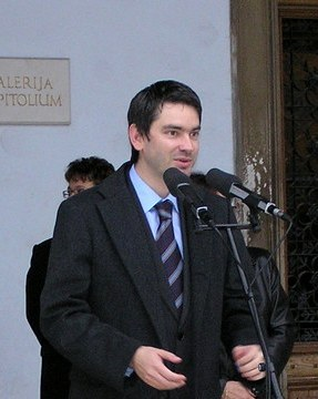 Boris Miletić.